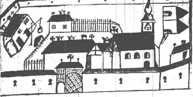 Беларуская (тарашкевіца): Берасьце (Bieraście), Замухавечча (Zamuchaviečča). Кляштар бэрнардынак, фрагмэнт мэтрыкі